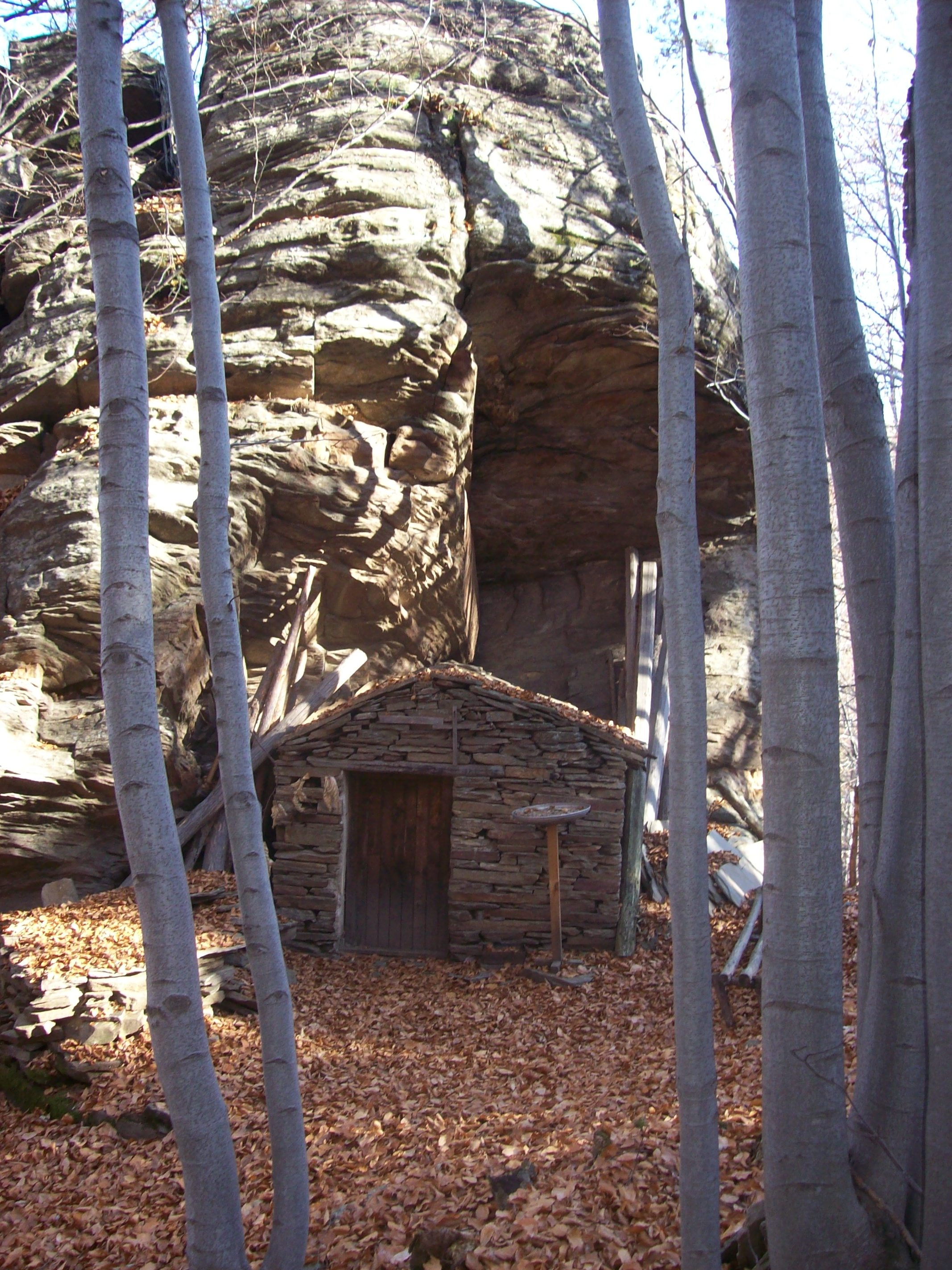 Параклисът Свети Дух, Бойково